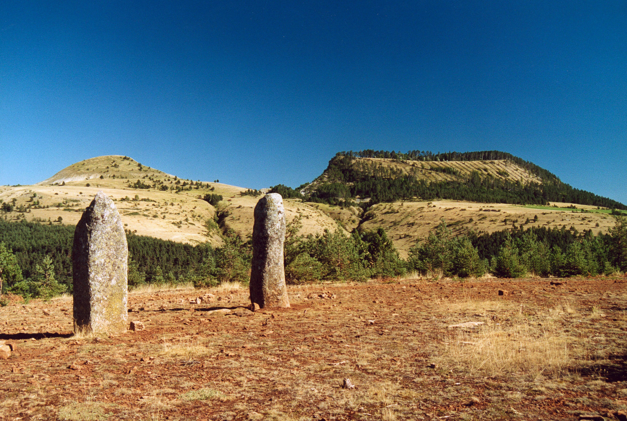 France Lozère Les Bondons Le Cham des Bondons Photographie prise par GIRAUD Patrick Août 2005